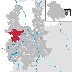 Harth-Pöllnitz in Thuringia - District Greiz